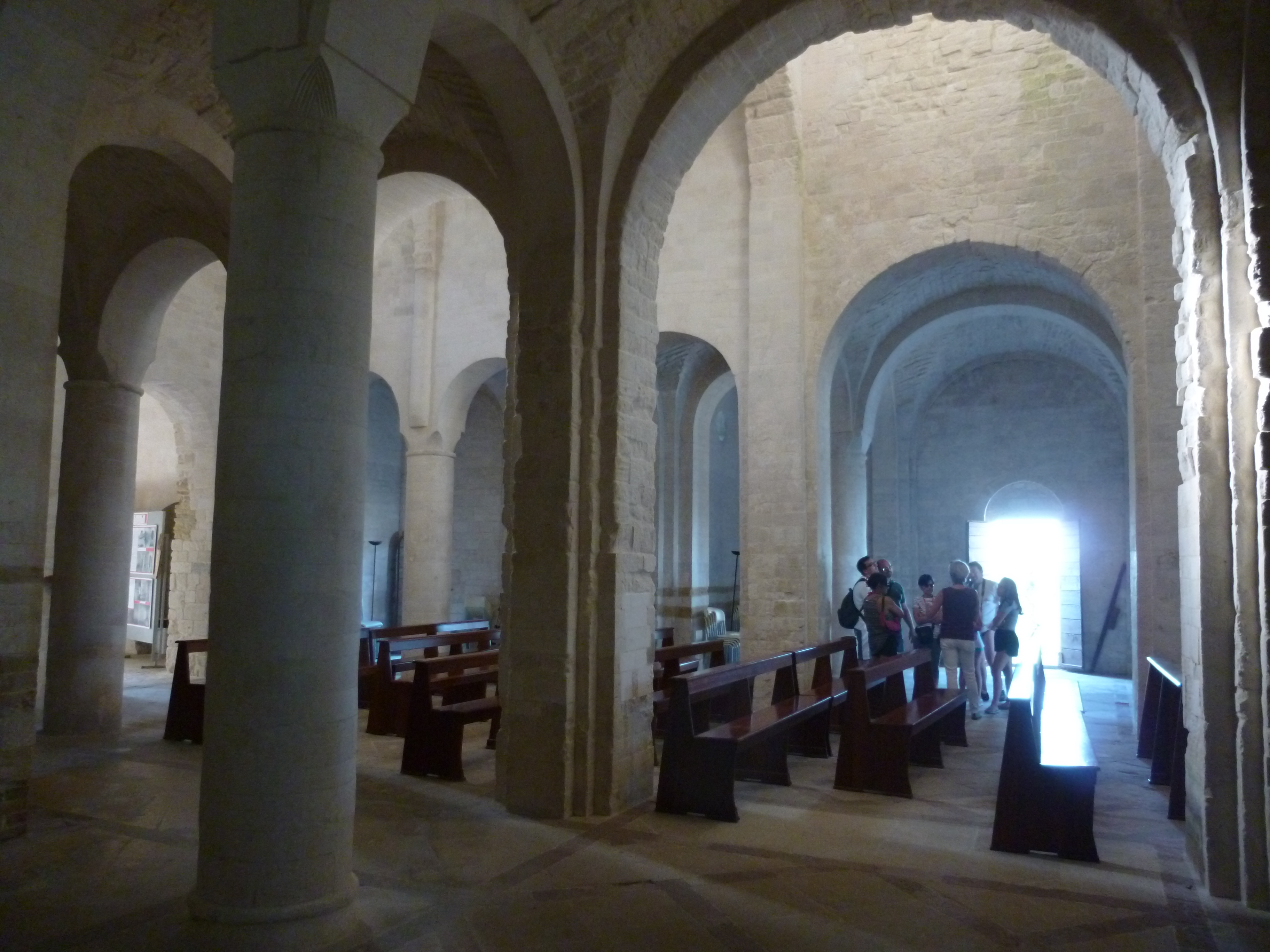 Chiesa di Santa Maria di Portonovo This is a photo of a monument which is part of cultural heritage of Italy.